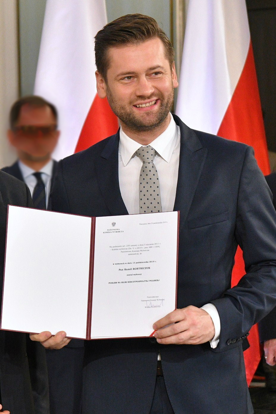 Kamil Bortniczuk (polityk, urzędnik i samorządowiec) odbiera w Sejmie RP zaświadczenie o wyborze na posła IX kadencji.